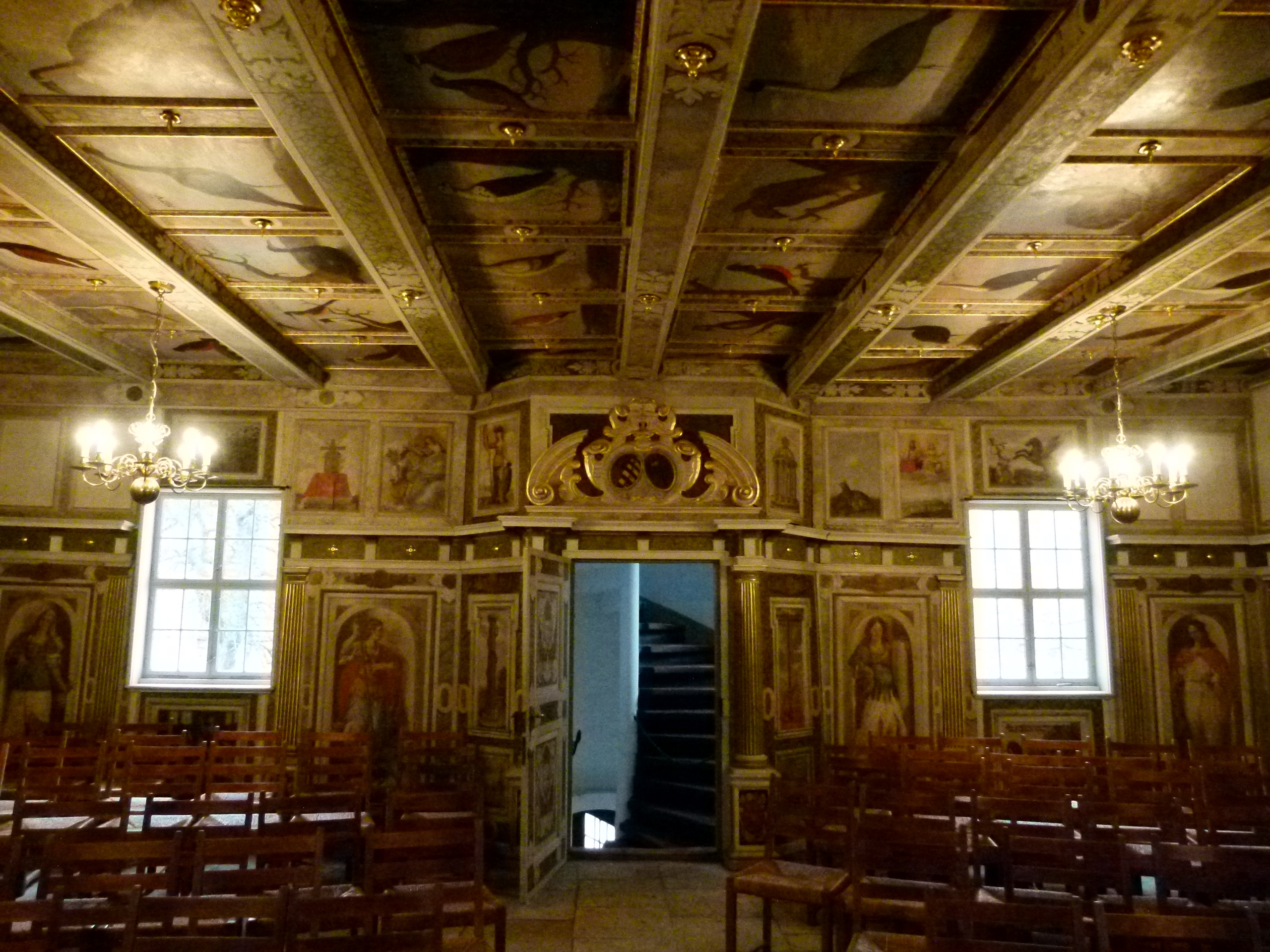 Festsaal des Lust- und Berghauses des Städtischen Weingutes Hoflößnitz in Radebeul